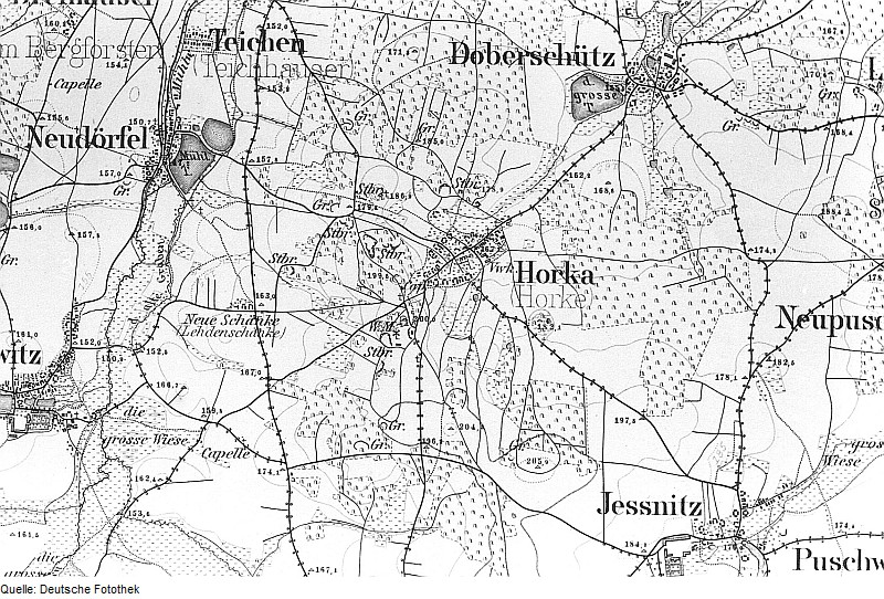 Original image description from the Deutsche Fotothek Crostwitz-Horka. Meßtischblatt, Sekt. Kloster Marienstern, 1884